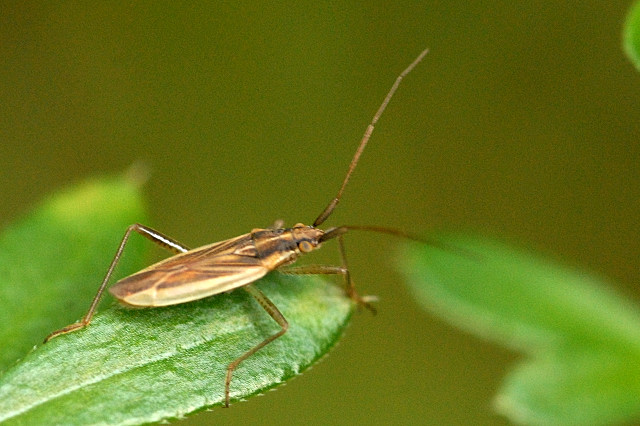 Stenodema holsata from Commanster, Belgian High Ardennes .